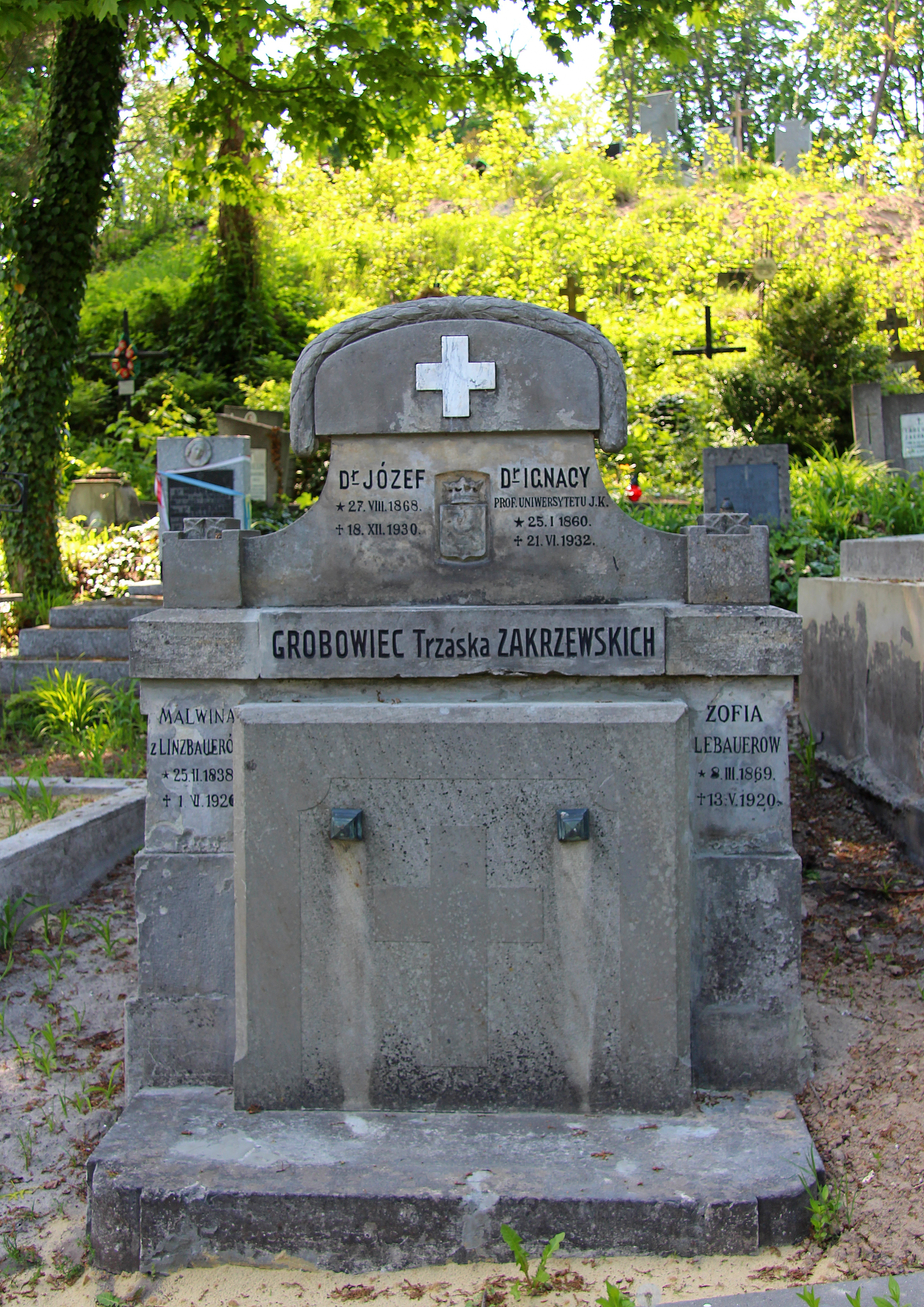 Родинний гробівець Закржевських. Личаківський цвинтар , поле № 36.